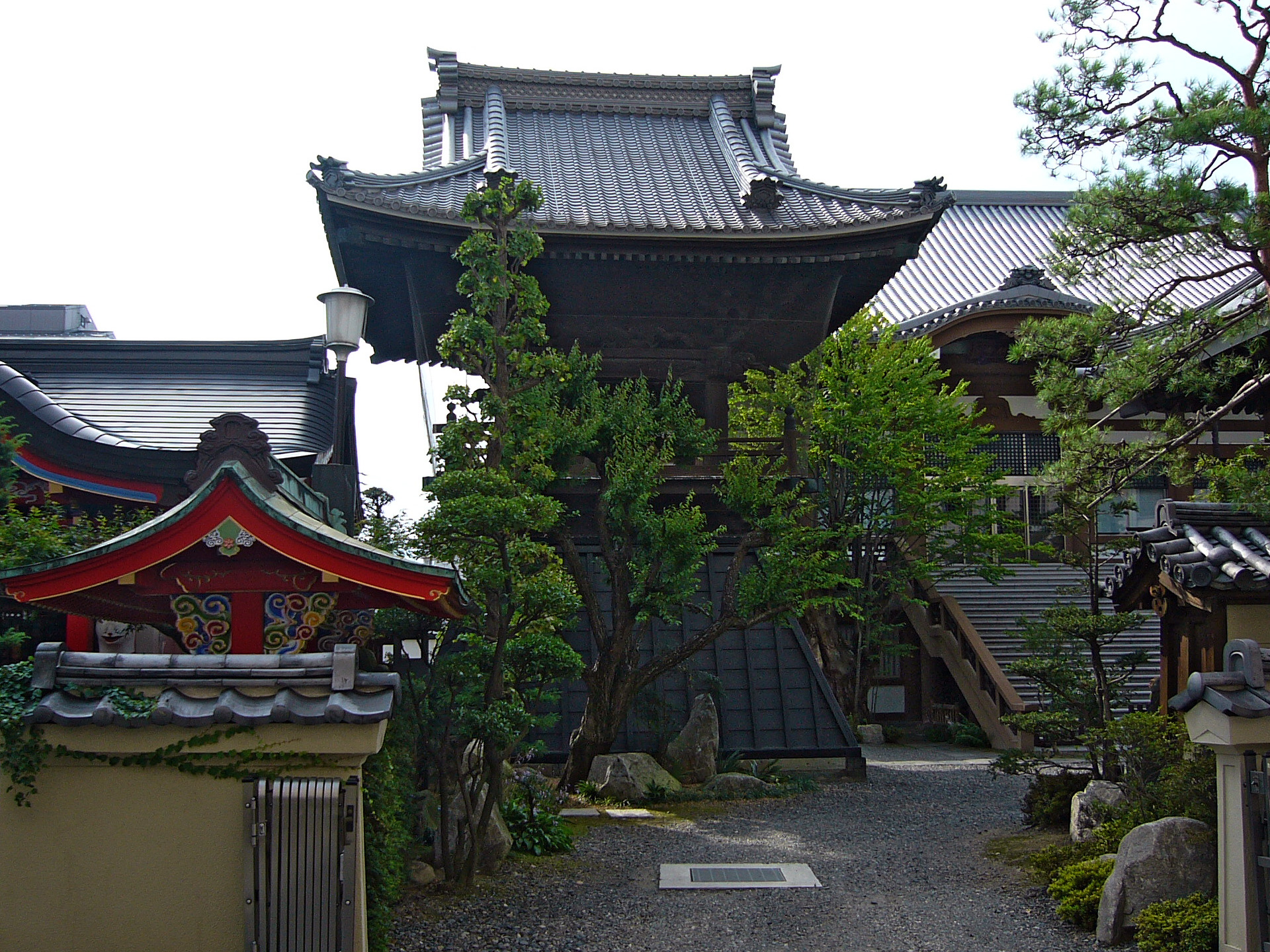 Jorinji in Matsumoto, Nagano, Japan